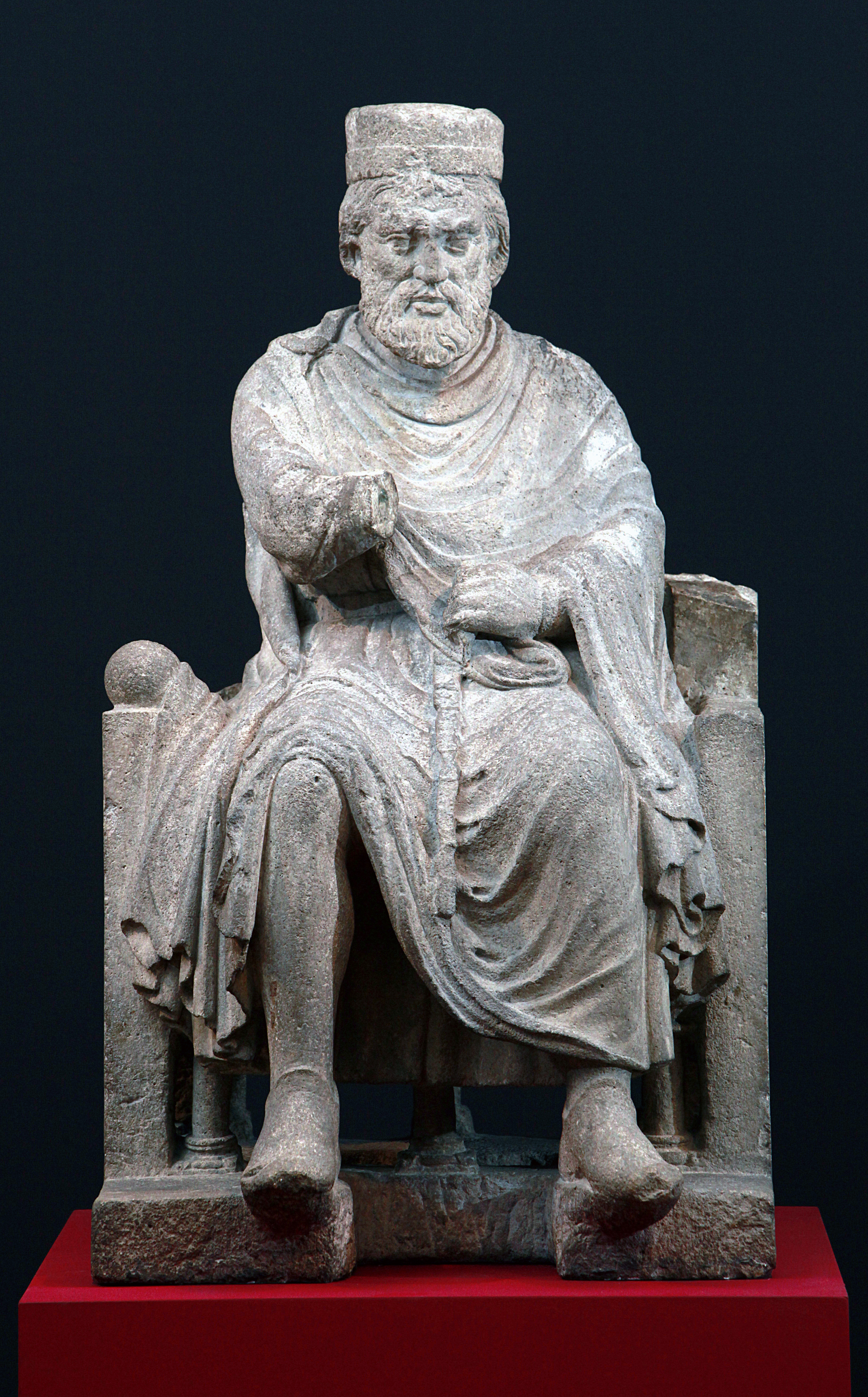 Thronender König aus dem Metropolitan Museum New York, Hauptmotiv der Ausstellung "Die Staufer und Italien" in den Reiss-Engelhorn-Museen in Mannheim.